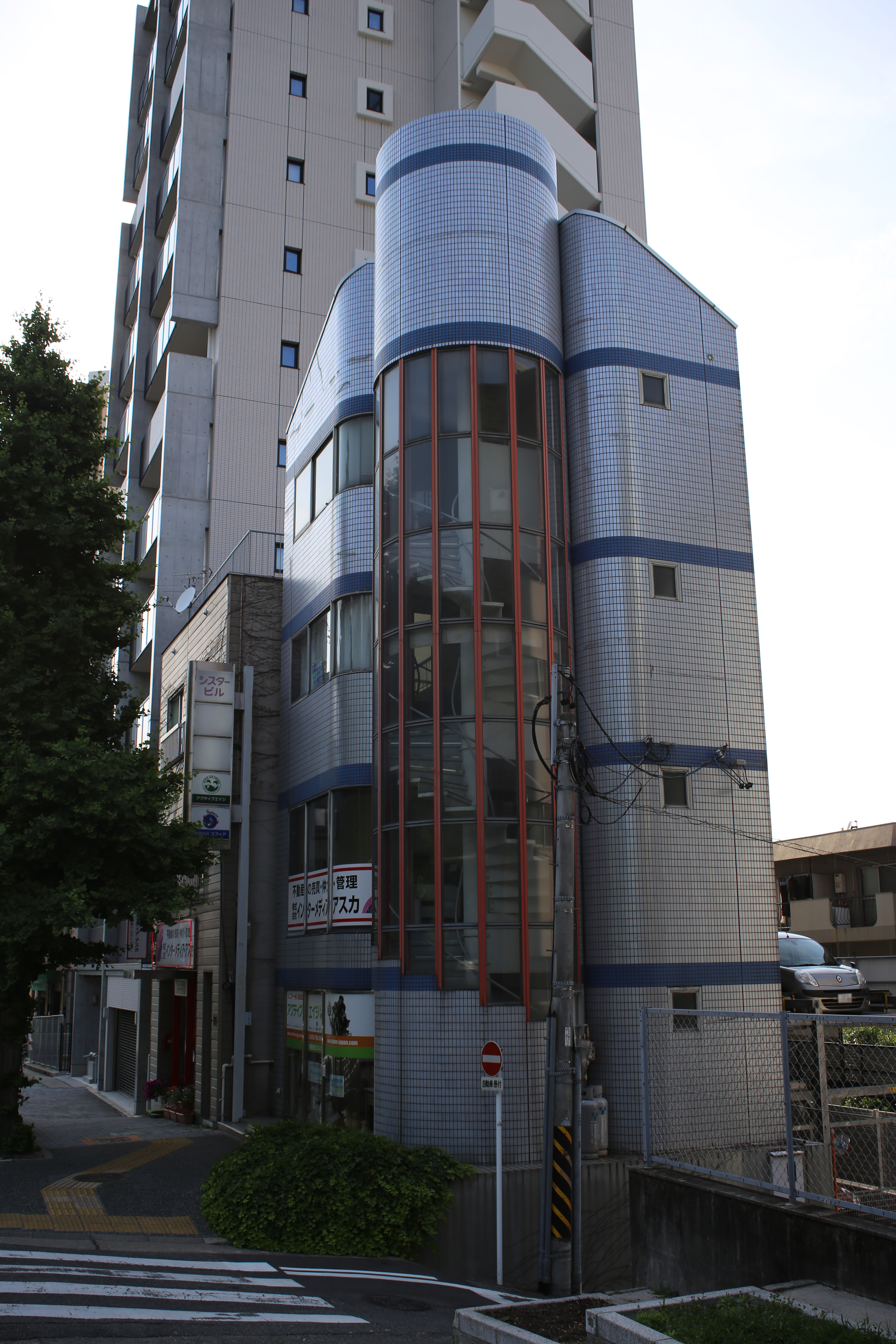 名古屋市千種区東山通5丁目のシスタービルを南側公道東側より撮影。ただし、ナンバープレートにつき画像処理済。